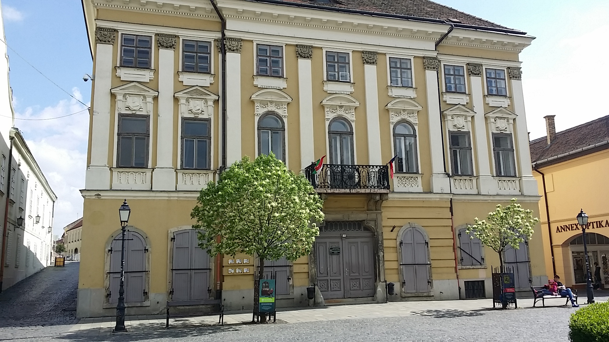 Székesfehérvár polgármesteri hivatal, Városháza. 17. századi eredetű, barokk műemlék ház ID 3915, Bővítve 1712-1718. Mai alakjában késő barokk, 1790. Udvari beépítése 1937-1938-ból. Szabálytalan alaprajzú, kétszintes, belső udvaros copf stílusú épületegyüttes, cseréptetővel. Valamennyi ablaknyílása szalagkeretes, egyenes záródású, domborított mezőkkel, ornamentális dísszel. - Magyarország, Fejér megye, Székesfehérvár, Belváros, Városház tér 1., Kossuth u. 1. This is a photo of a monument in Hungary, Identifier: 3915